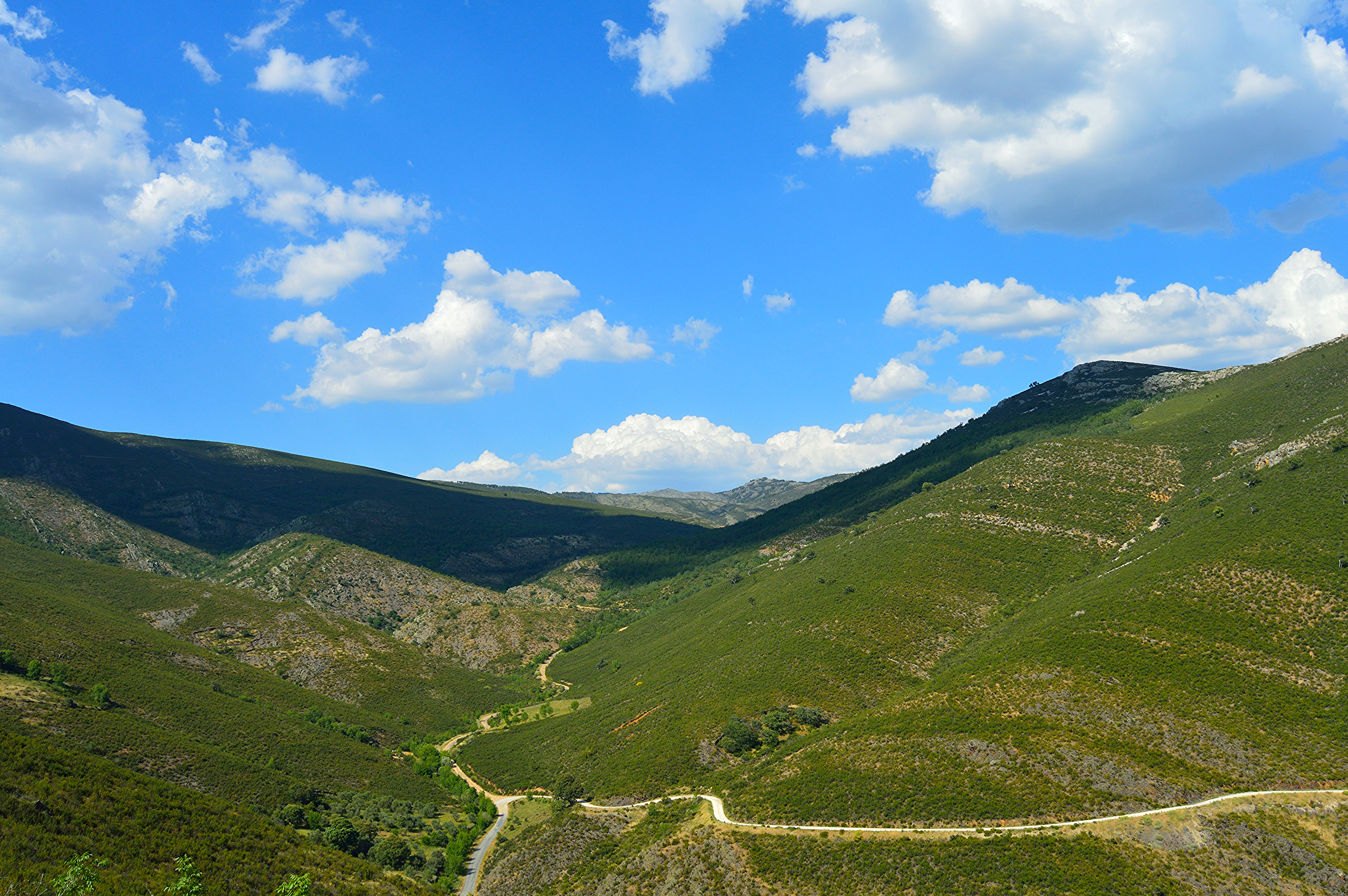 El Atazar - Sierra Norte de Madrid